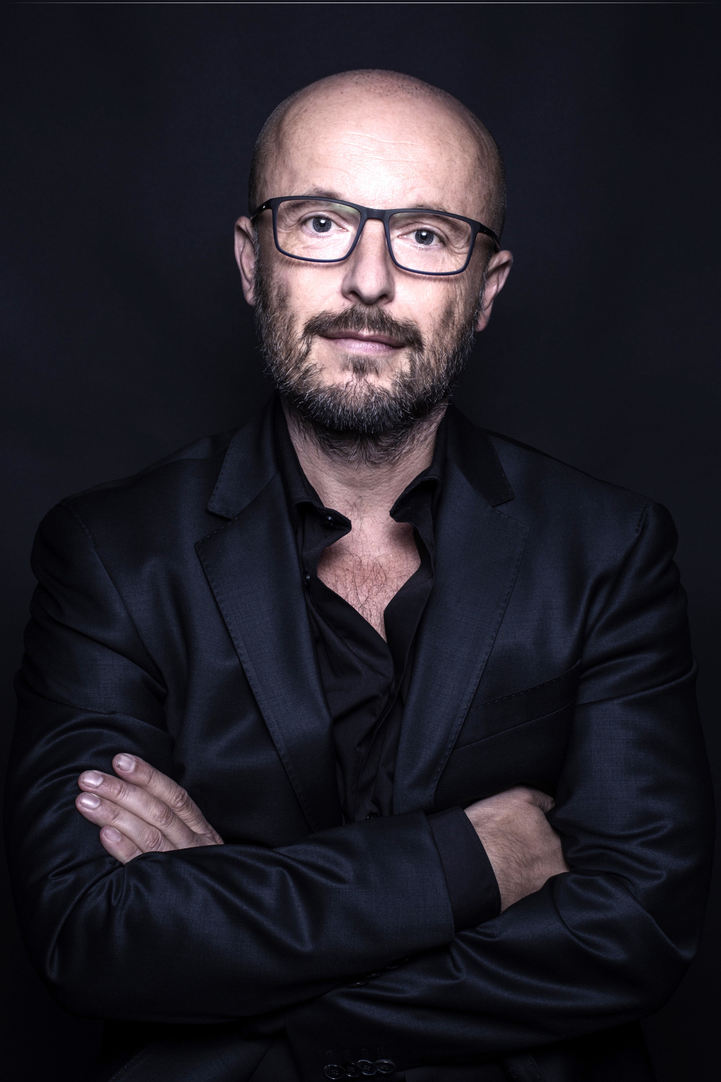 fotografie, autor Jiri Langpaul, copyright vlastní Tomáš Mašín, vlastní archiv